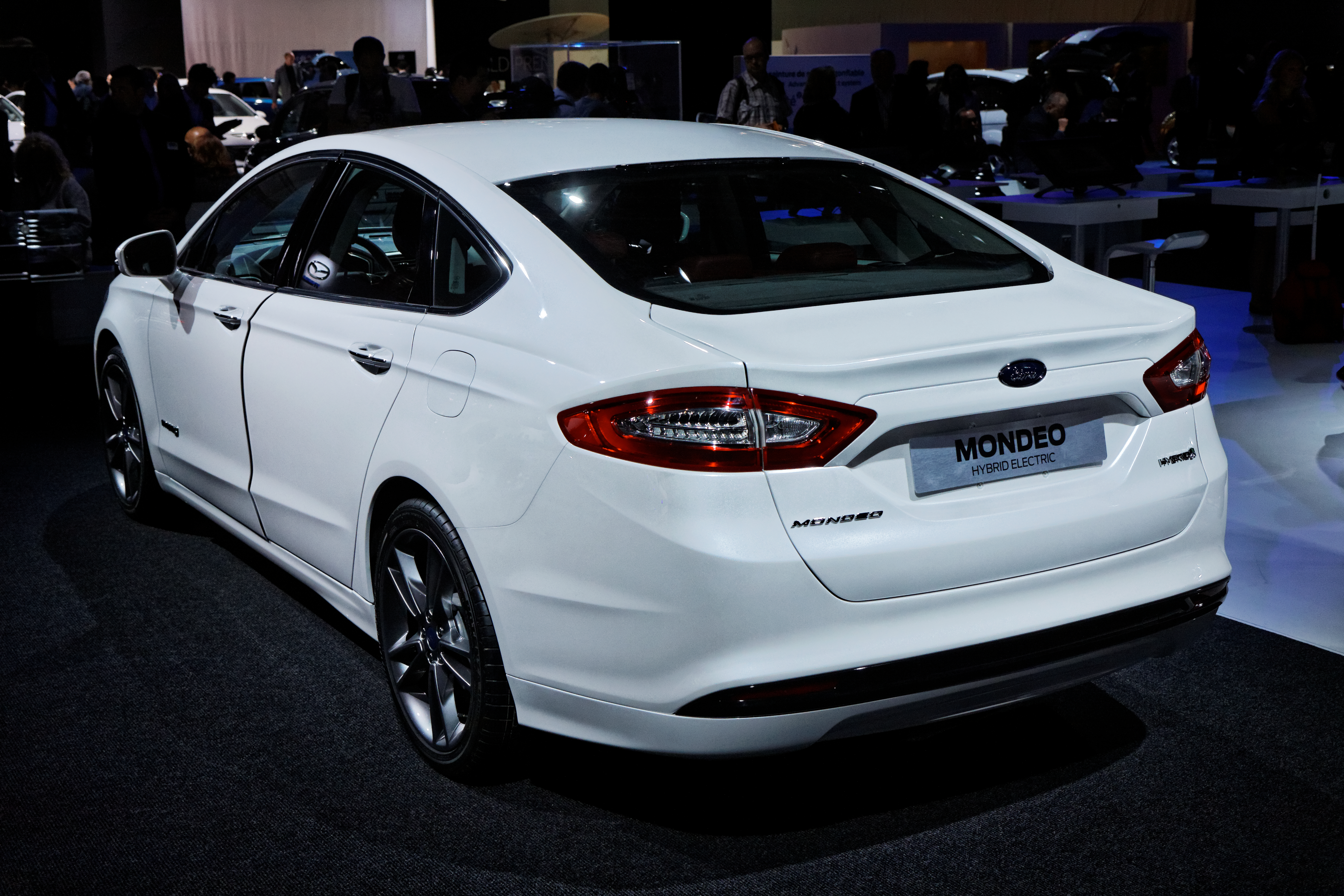 La Ford Mondeo présentée lors du Mondial de l'Automobile de Paris 2012.